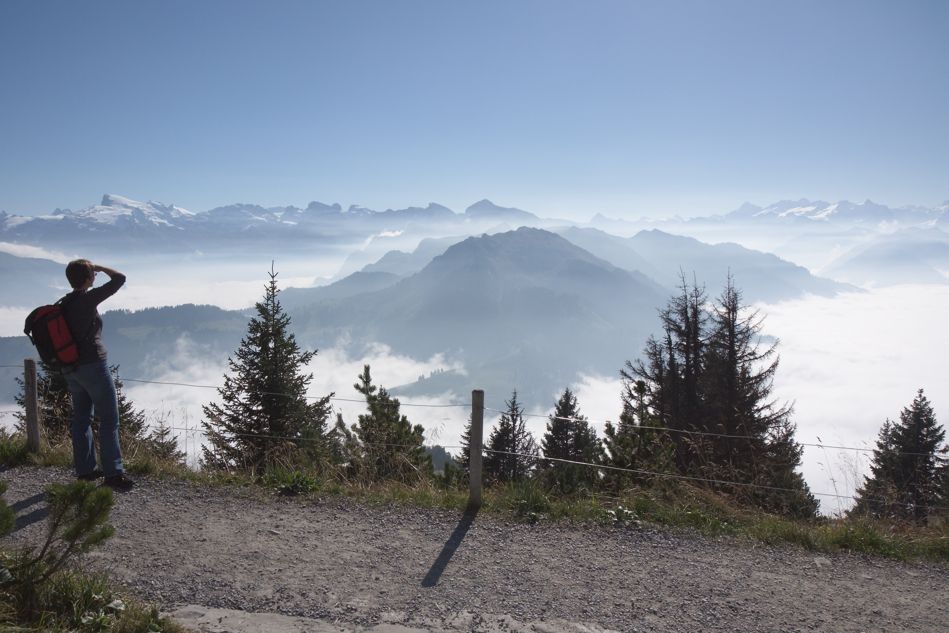 Aussicht vom Stanserhorn richtung Süden